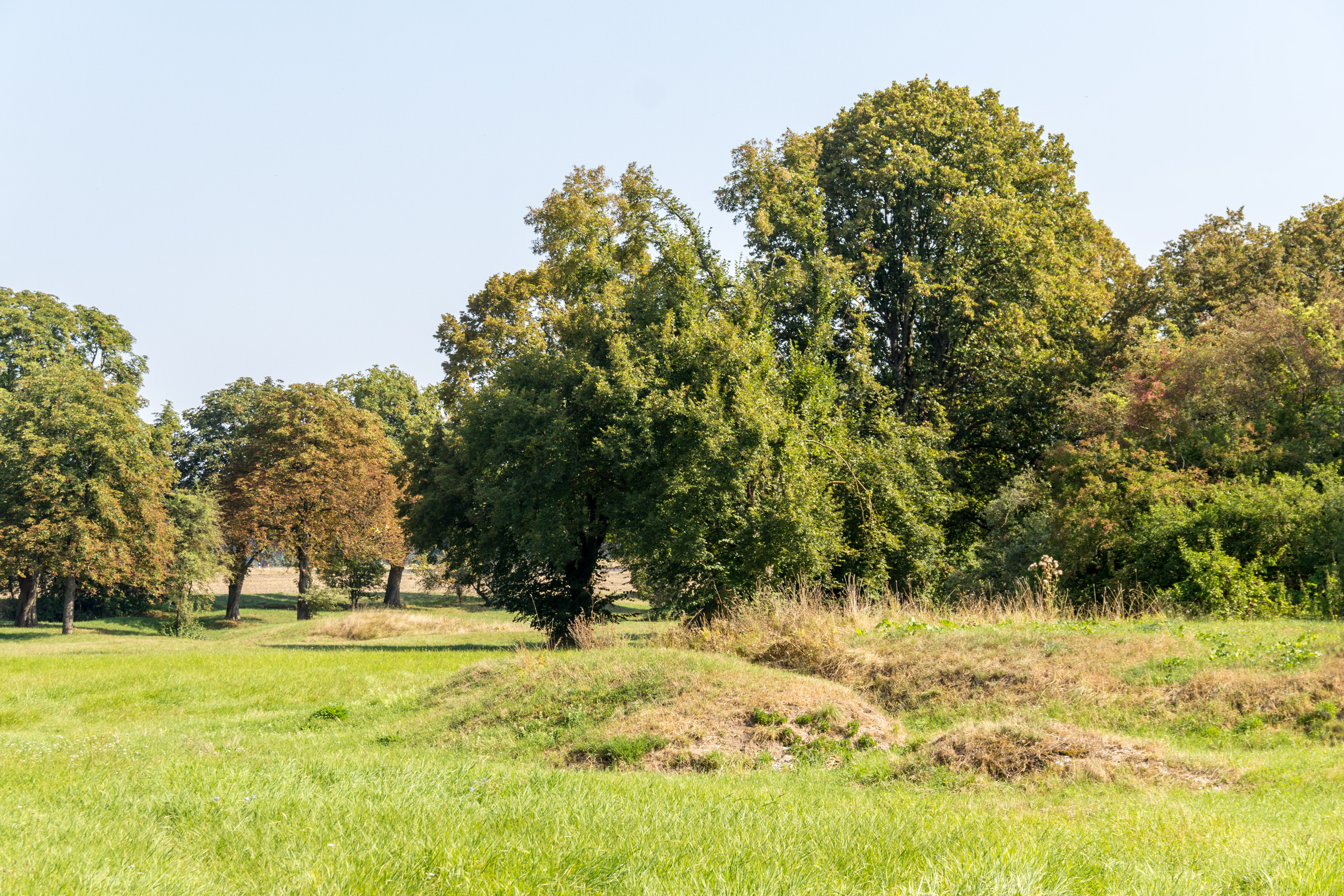 Sulzheimer Gipshügel, Naturschutzgebiet, Geotop, Sulzheim in Unterfranken